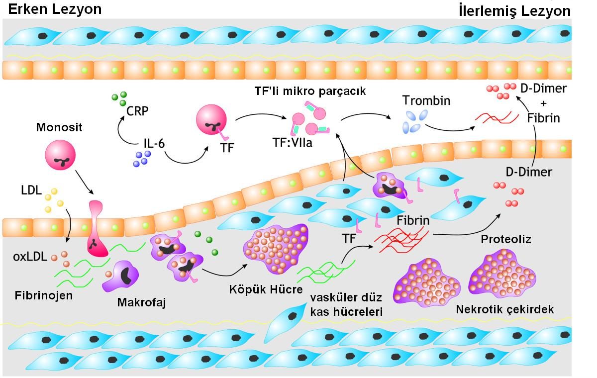 LDL'nin damar intima matrisinde oksitlenmesi (oxLDL) aterom oluşumunun ilk adımıdır. Endotel hürlerinin oxLDL tarafından uyarılması kandaki monositelerin seferber olup damar duvarına girmesine neden olur. Monositlerin makrofajlara dönüşümü ve kümelenmiş oxLDL'nin Avcı Reseptör (Scavenger receptor') tarafından bu hücrelerin içine alınması sonucu köpük hücreler meydana gelir. Damar düz kas hücrelerinin uyarılmısı bunların harekete geçmelerine ve çoğalmalarına neden olur. Doku Faktörü (Tissue Factor, TF), düz kas hücreleri ve makrofajların yüzeyünde belirir ve birikmiş fibrin'in fibrinojene dönüşmesine neden olur. en: The initiation of an atherosclerotic lesion is characterized by retention of LDL and subsequent oxidative modification (oxLDL) within the matrix of the vascular intima Figure 1 from "Blood coagulation and the risk of atherothrombosis: a complex relationship" Henri MH Spronk , Danielle van der Voort and Hugo ten Cate (2004) Thrombosis Journal 2004, 2:12 [1] tr: LDL'nin damar intima matrisinde alıkonup orada oksidatif değişime uğraması aterosklerotik lezyonu başlatır. "Blood coagulation and the risk of atherothrombosis: a complex relationship" Henri MH Spronk , Danielle van der Voort and Hugo ten Cate (2004) Thrombosis Journal 2004, 2:12 [2] makalesinde Resim 1.